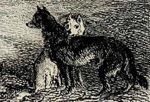 Perros fueguinos en el Tolderío de Patagones en Bahía Gregorio en 1827. Visita del almirante Phillip Parker King. Tomado de "Narrative of the surveying voyages of His Majesty's Ships Adventure and Beagle between the years 1826 and 1836, describing their examination of the southern shores of South America, and the Beagle's circumnavigation of the globe. Proceedings of the first expedition, 1826-30, under the command of Captain P. Parker King, R.N., F.R.S. London: Henry Colburn."